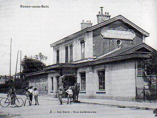 Carte postale ancienne éditée par Fleury, N°3 Gare de Rosny-sous-Bois (bâtiment de 1856)